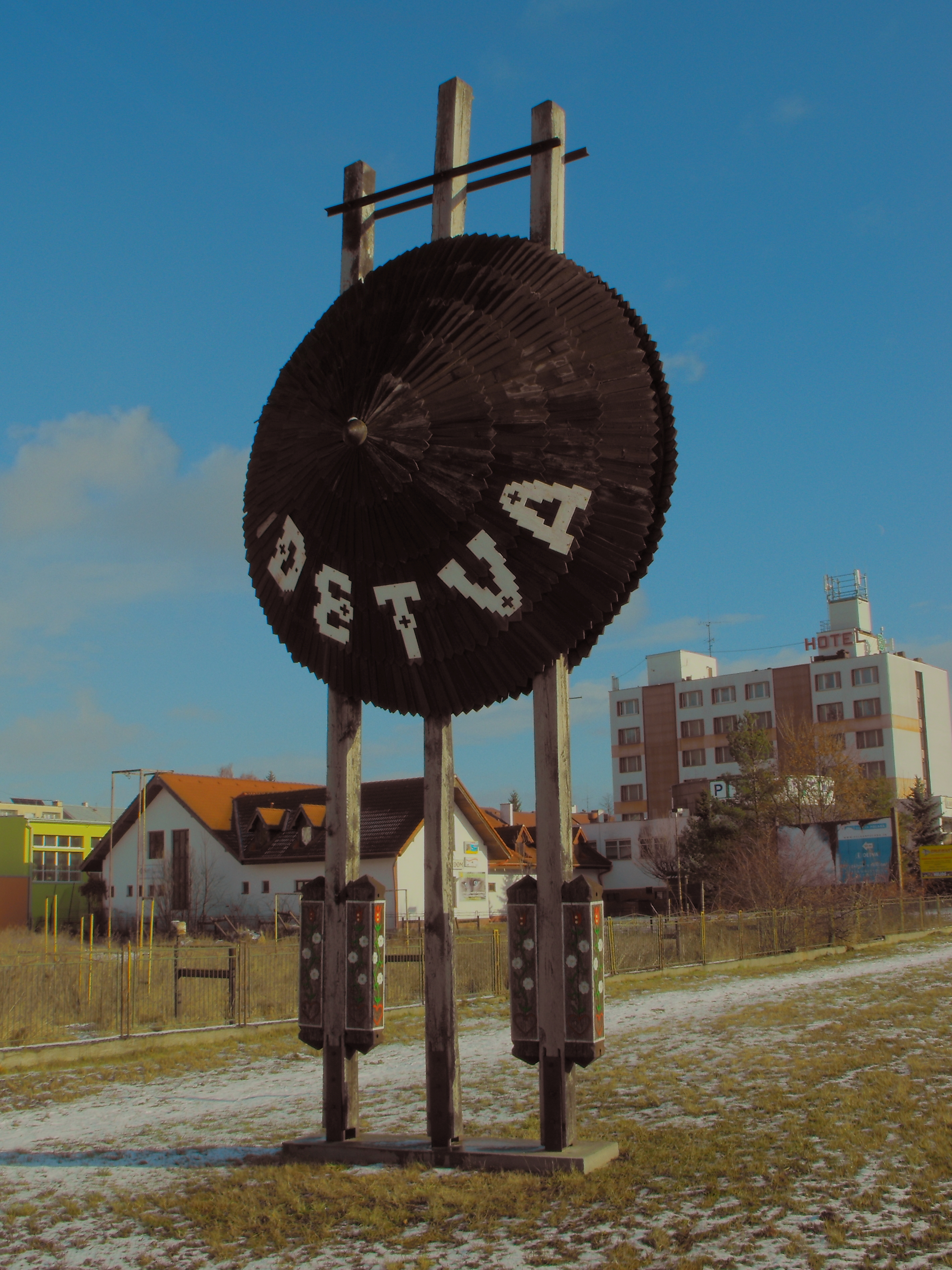 Bonvenigtabulo de urbo Detva, Slovakio. La tabulo situas ĉe la busa stacio, en okcidenta parto de la urbo. Malantaŭe estas la hotelo Detva.